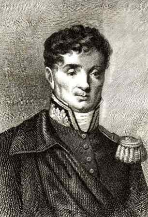 Marquês de Puysegur